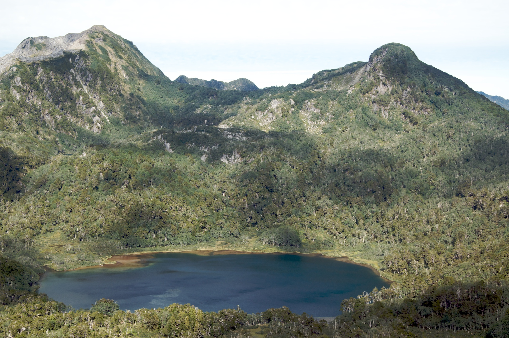 Huequi (volcano in Chile)